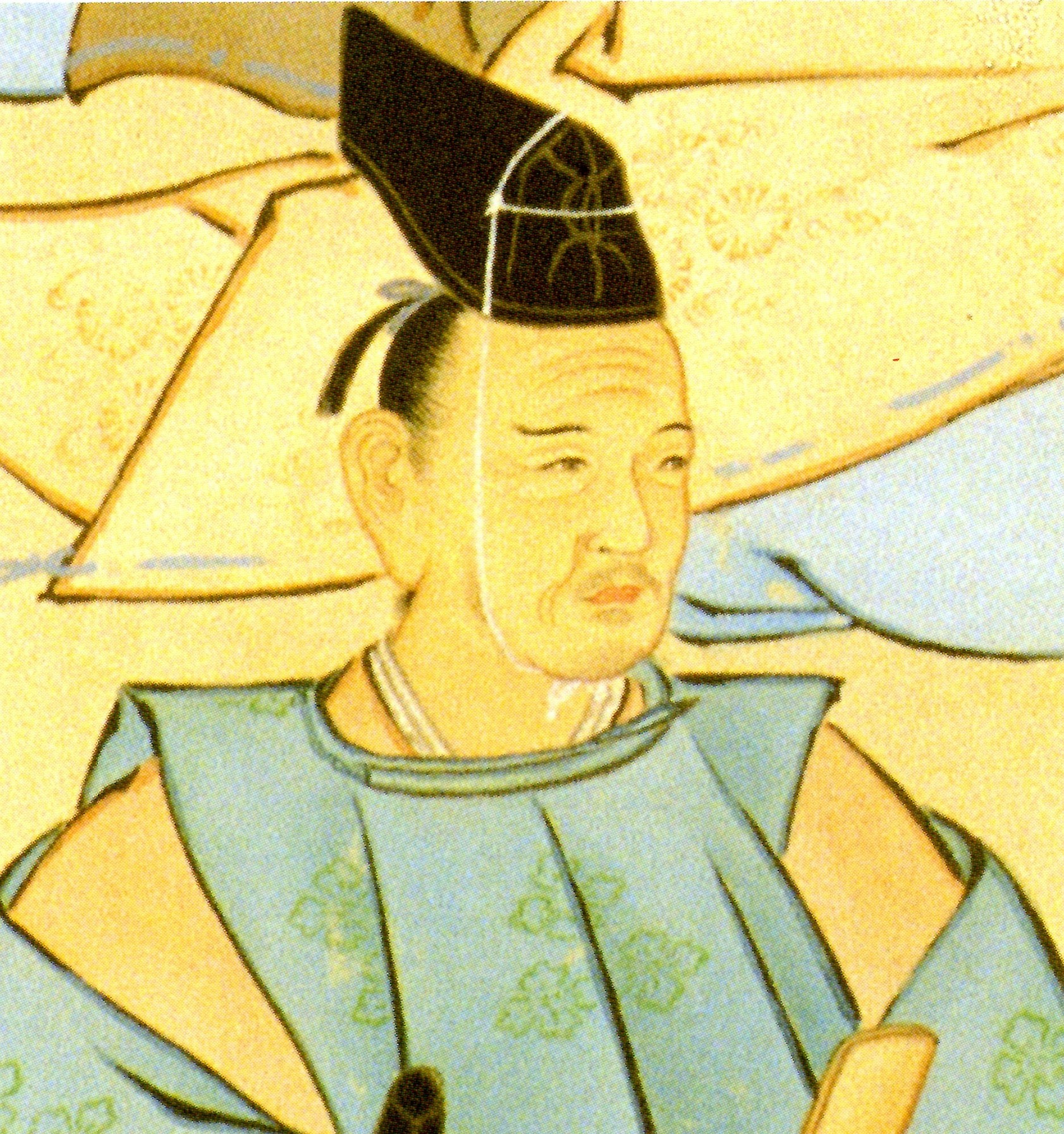 津軽信寧の肖像。